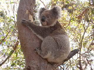 Koala in einem Eukalyptusbaum auf Kangaroo Island